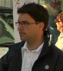 Sverigedemokraternas partiledare Jimmie Åkesson på ett torgmöte i Uddevalla inför EU-valet 2009.